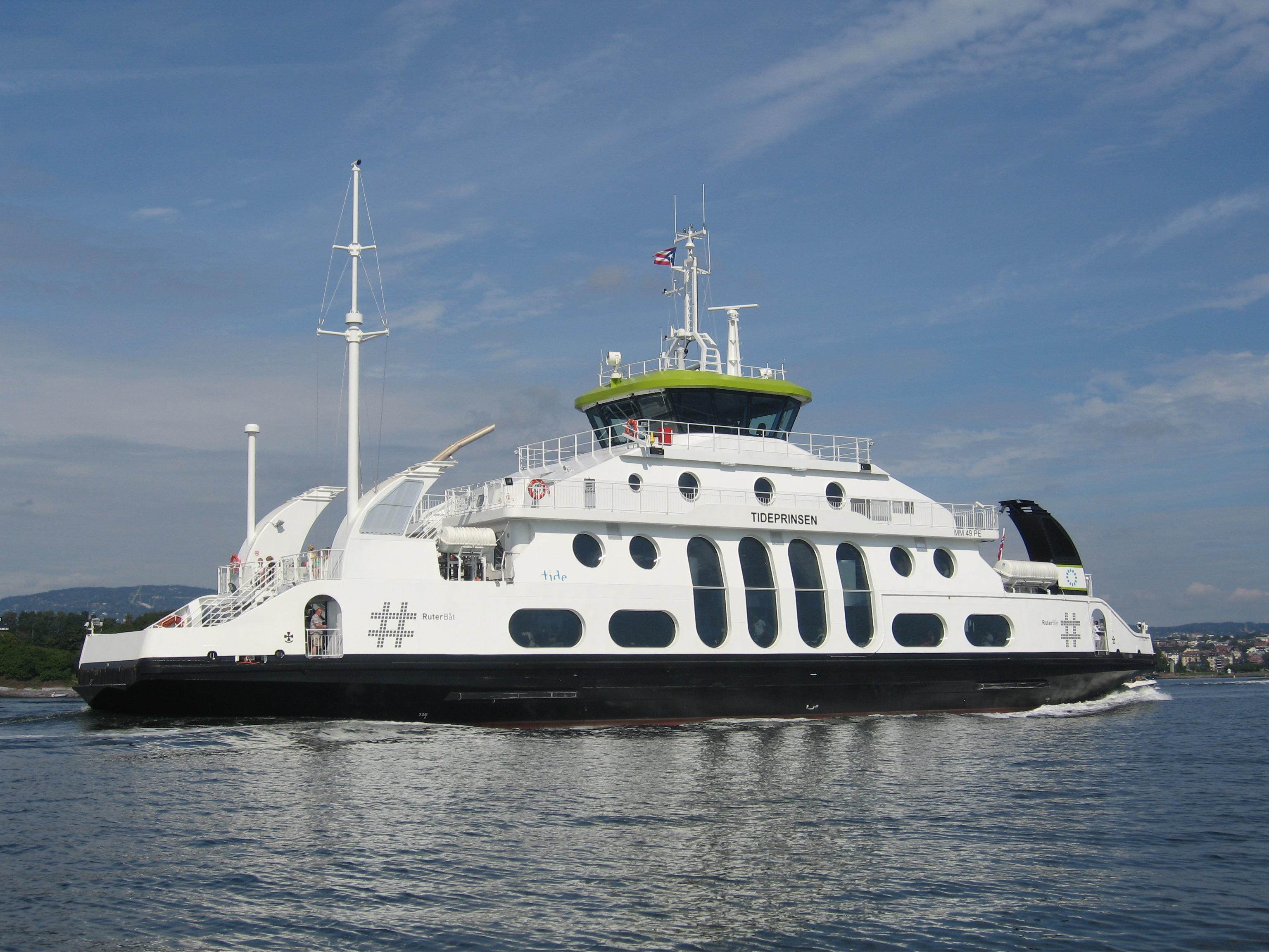 MS Tideprinsen på Oslofjorden i 2009. Foto Tore Sætre.